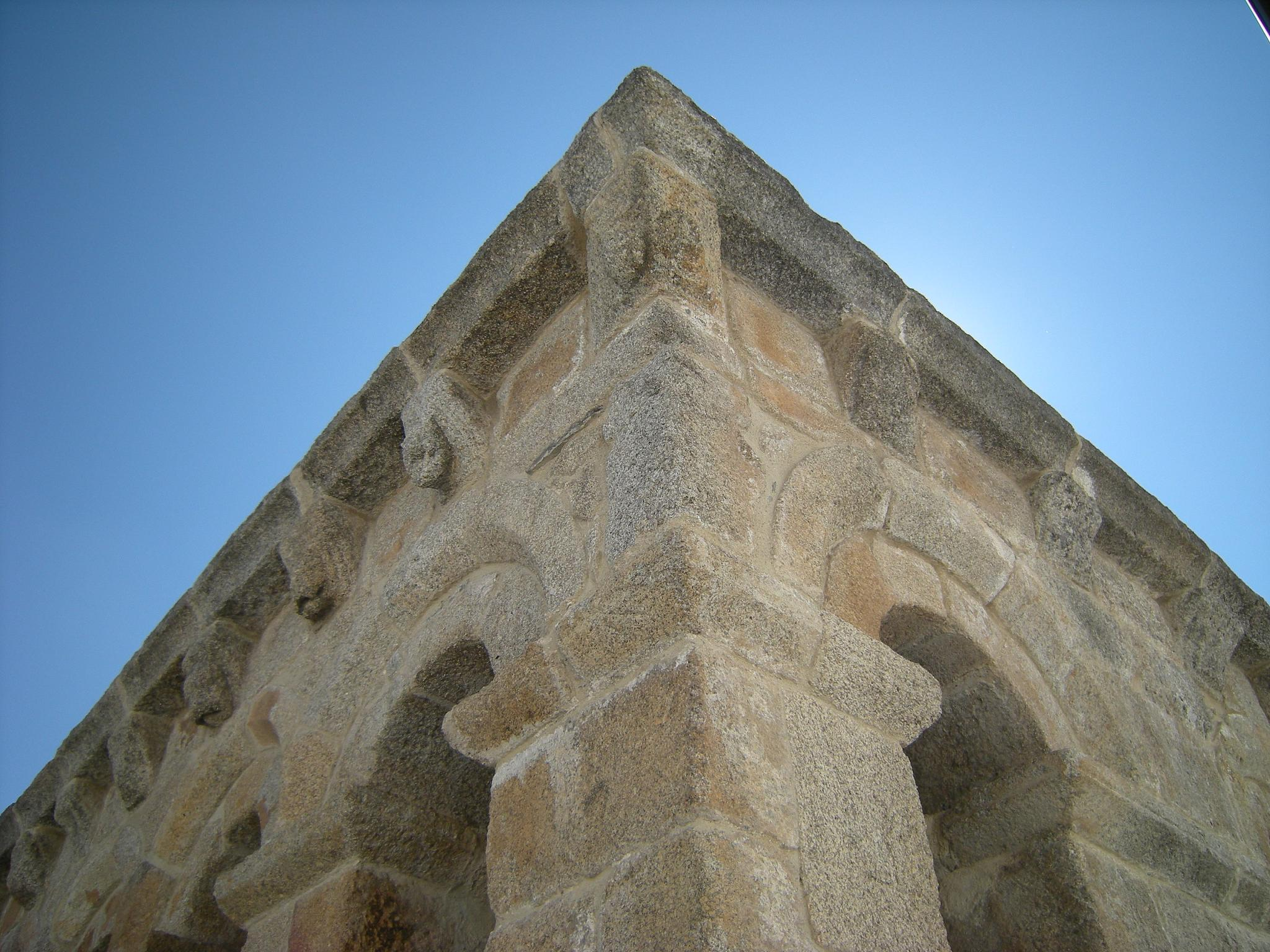 Domus municipalis de Bragança